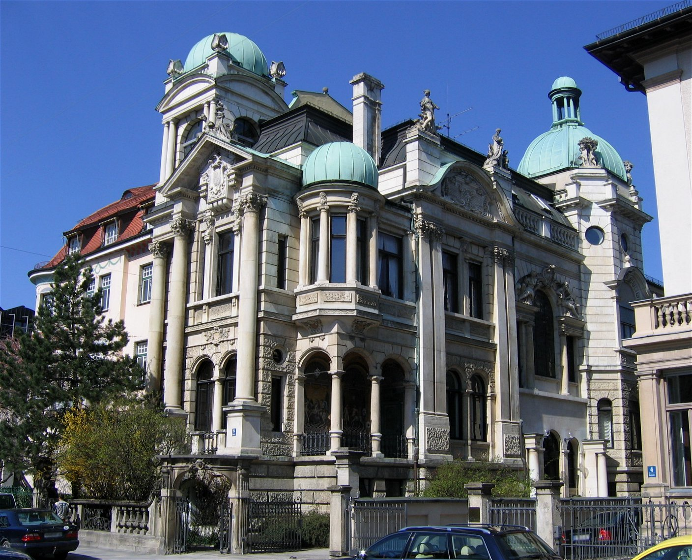 Georgenstraße 8; Pacelli-Palais, malerische, reich gegliederte Neubarockvilla, mit Kuppeln, 1880–81 von Josef Hölzle, 1900–01 von demselben umgebaut; in der Loggia Mosaiken, Plastiken von H. Schneider. D-1-62-000-2088